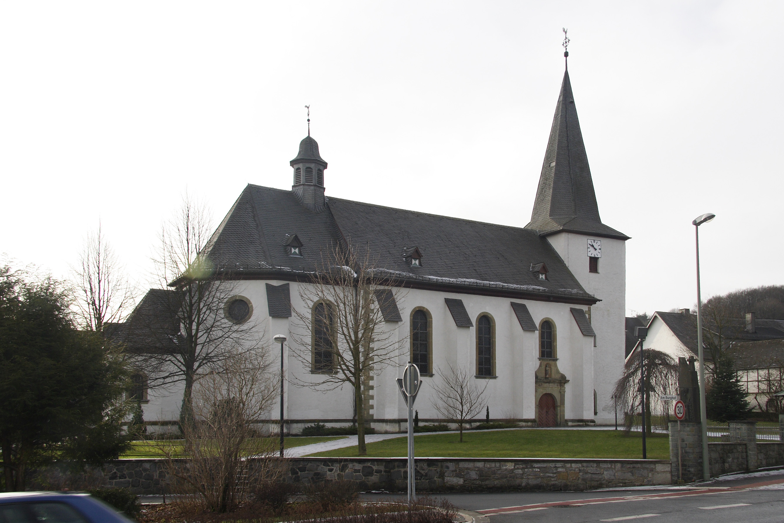 Dorfkirche von Altenbüren